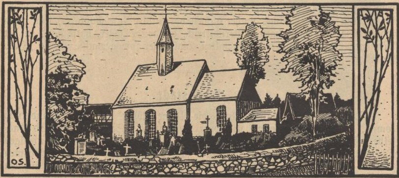 Beiträge zur Sächs. Volks- und Heimatkunde. Mit Zeichnungen von Professor O. Seyffert und Maler F. Rowland.